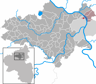 Niederwerth in Rhineland-Palatinate - district Mayen-Koblenz